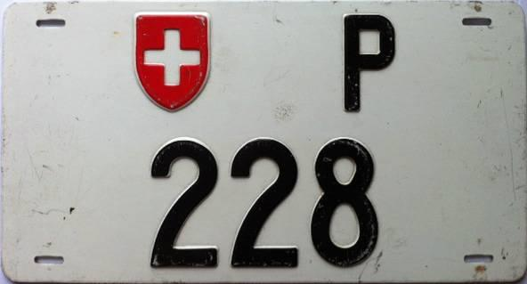 Post Autonummer back